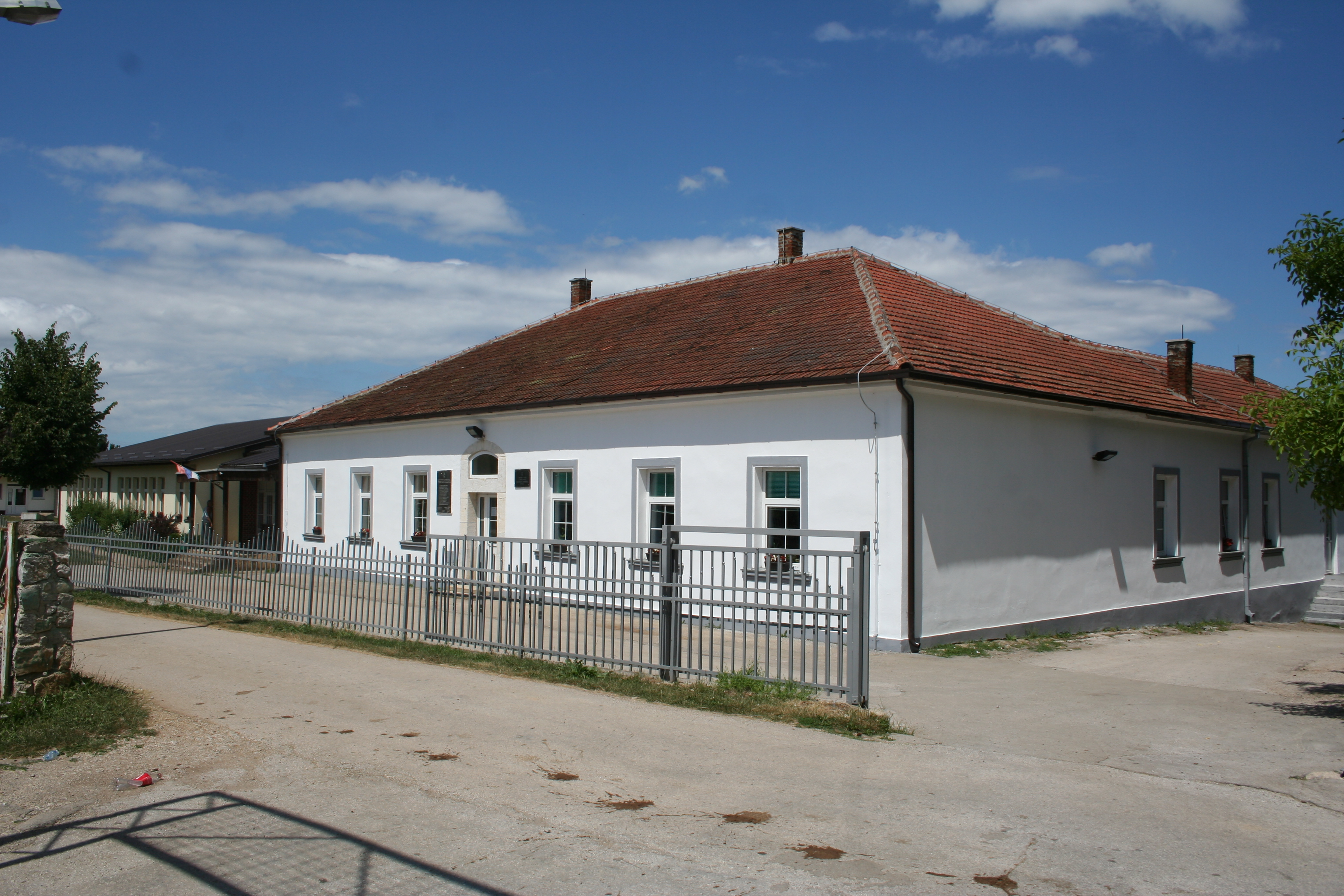 Mačkat